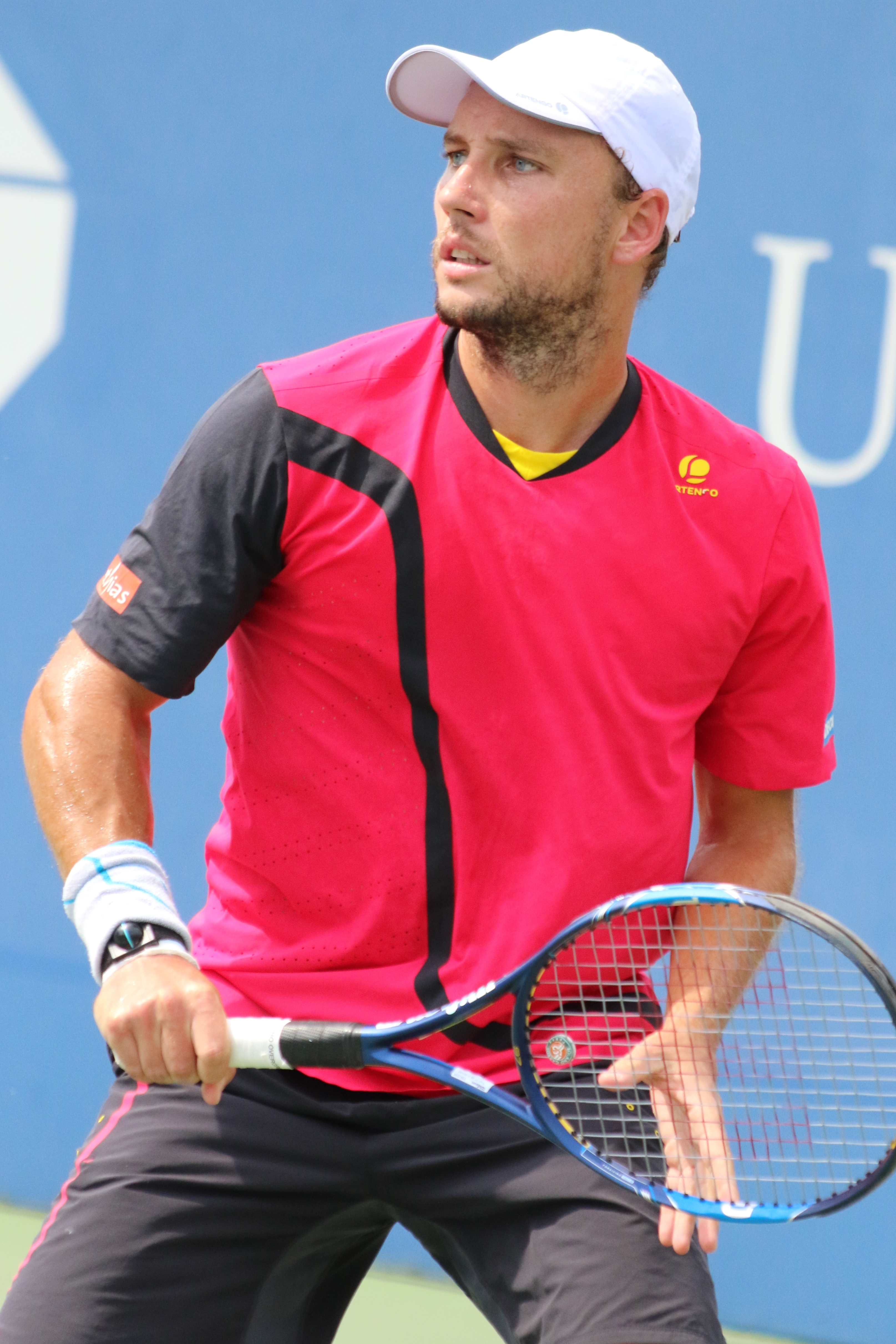 Darcis US16 (1)